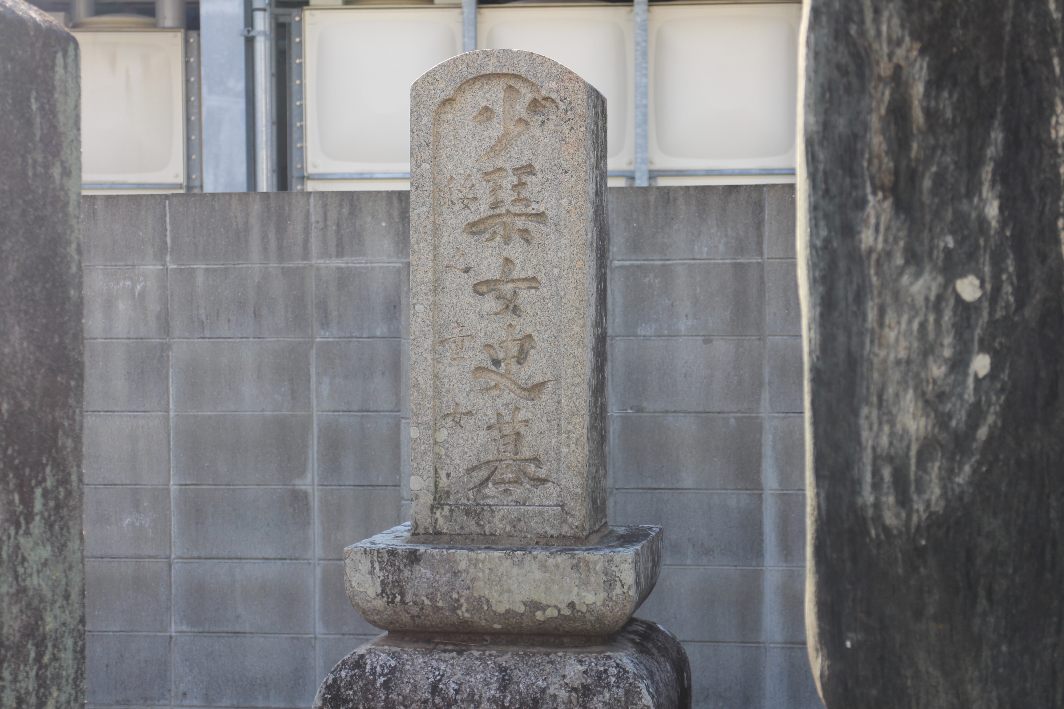 福岡市中央区地行 浄満寺 にある亀井小琴の墓